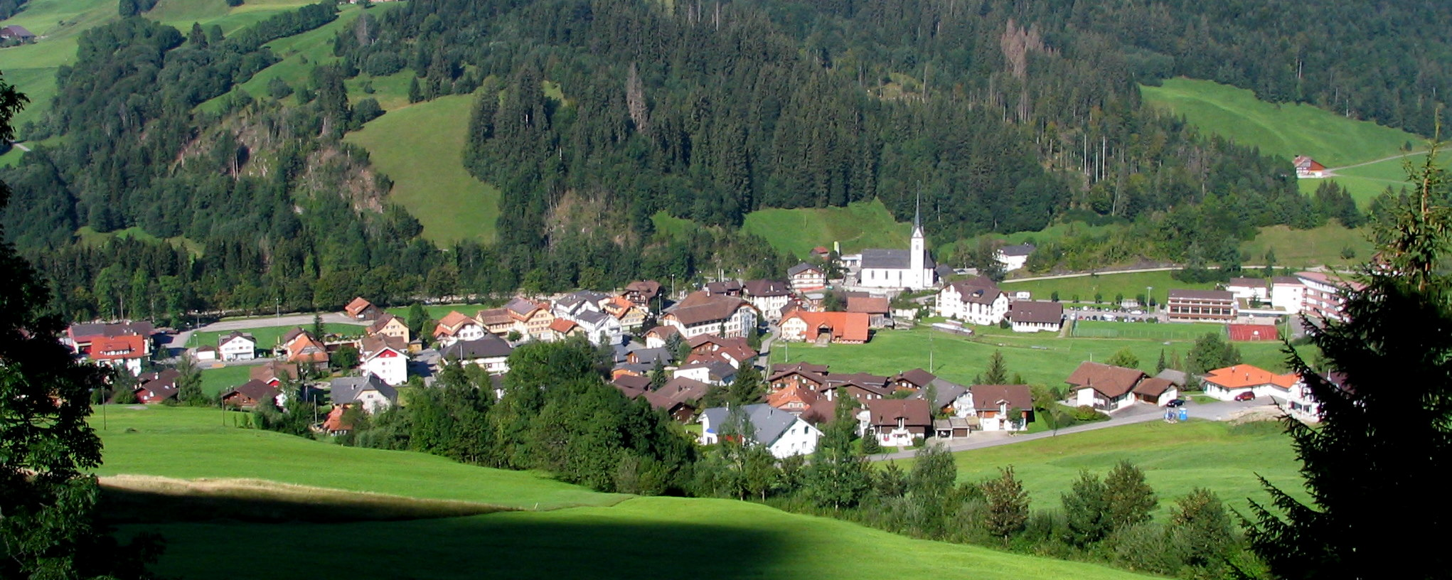 Das Dorf Flühli im Kanton Luzern (Schweiz) von Osten aus gesehen. / The village Flühli (Canton of Lucern, Switzerland) seen from East.